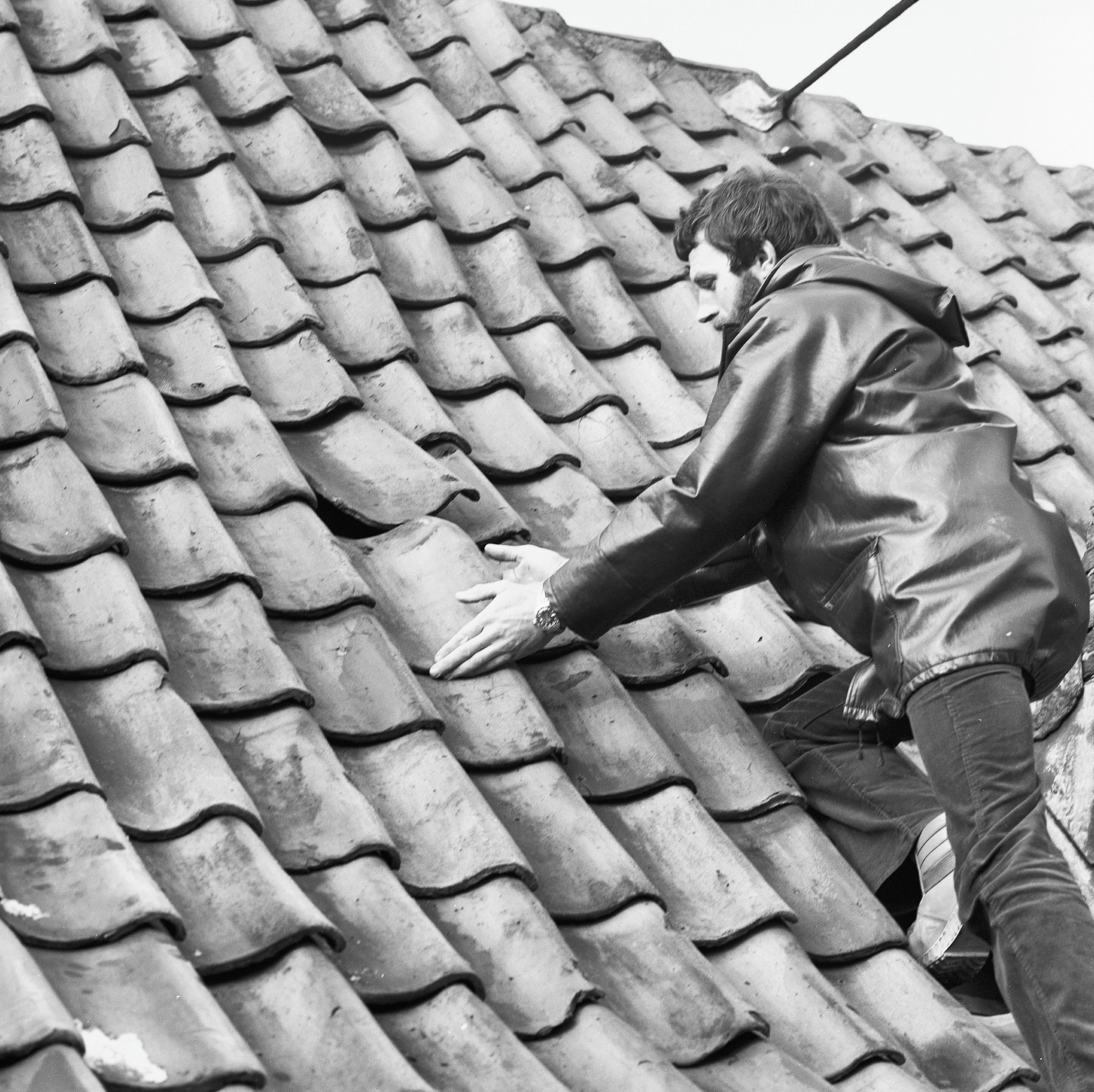 Onderhoud/ Dakbedekking: Jongeman toont slecht onderhoud aan dakbedekking